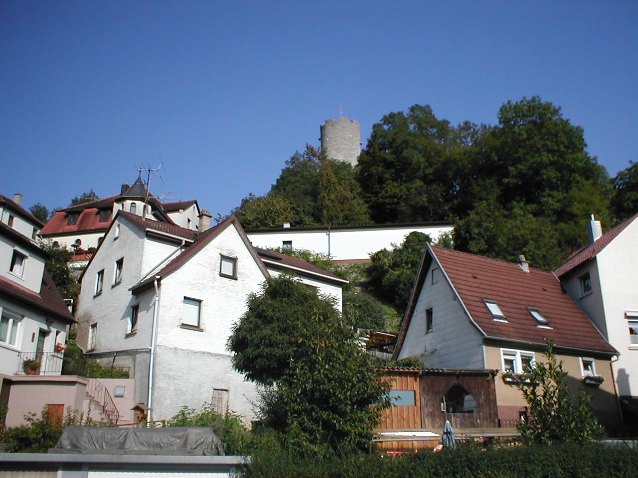 Bergfried der Ruine Heriboldisburg in Herbolzheim (Neudenau) im Jagsttal